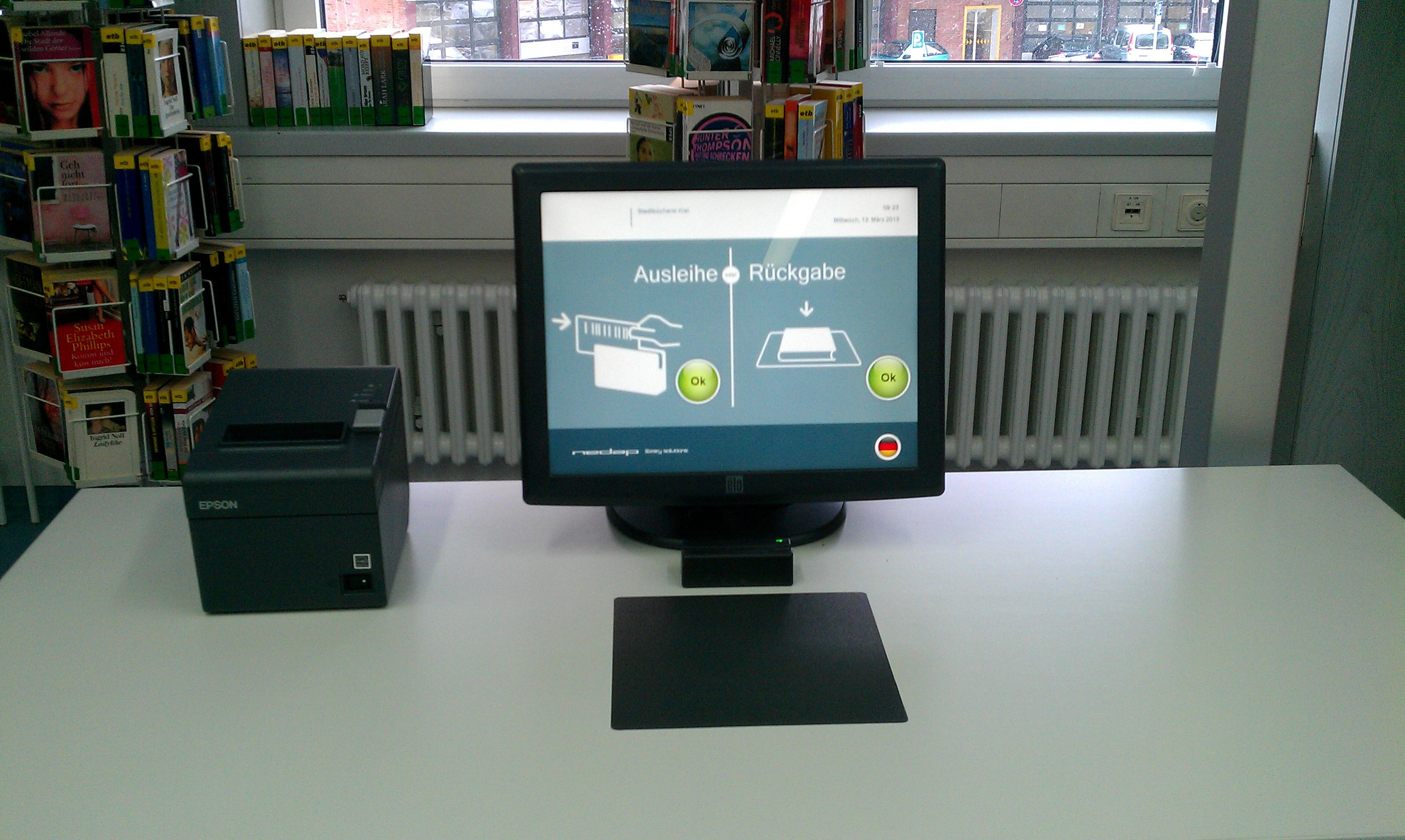 Selbstverbuchungsterminal